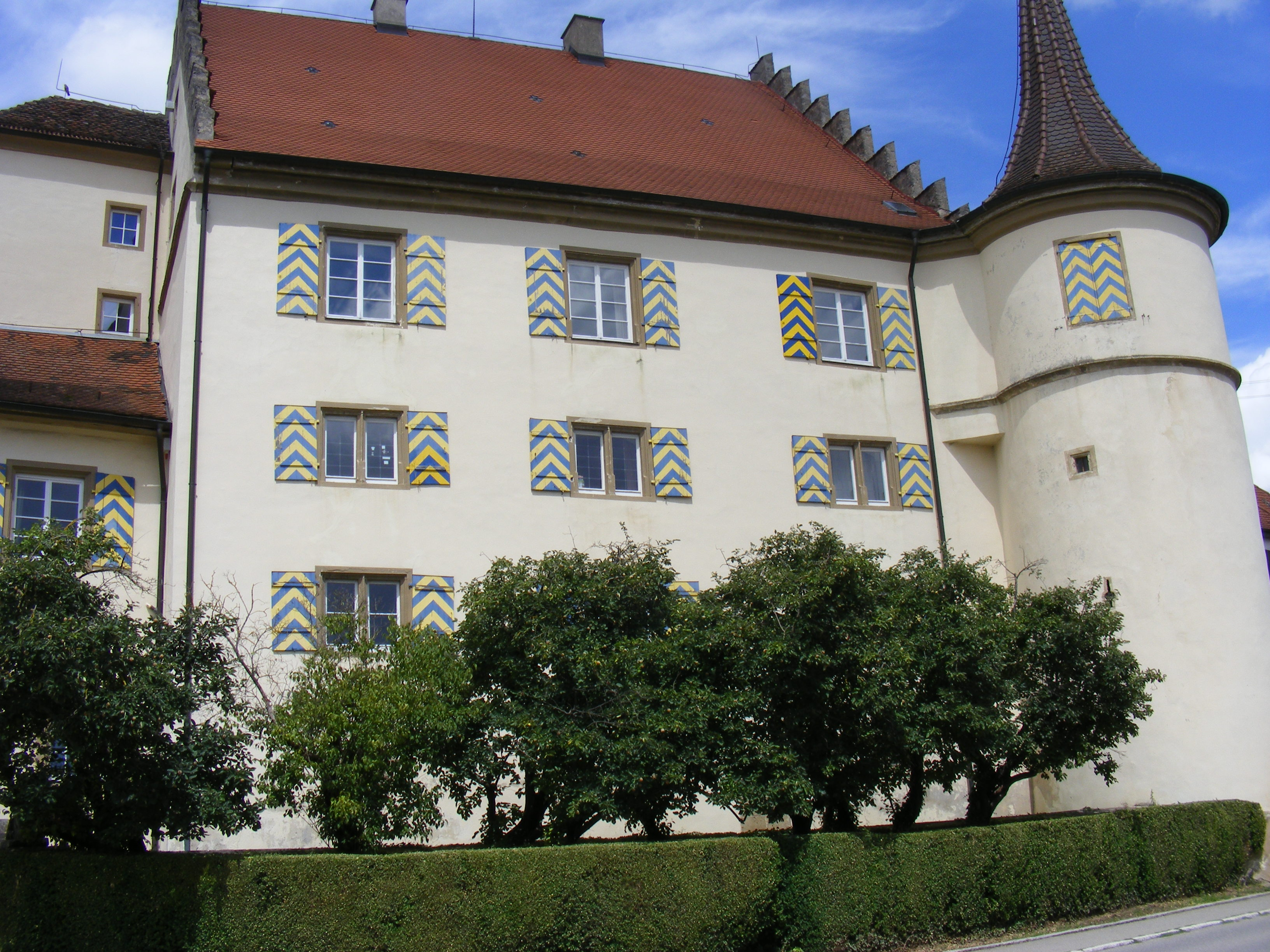 Süd-Ostseite des Wachendorfer Schlosses